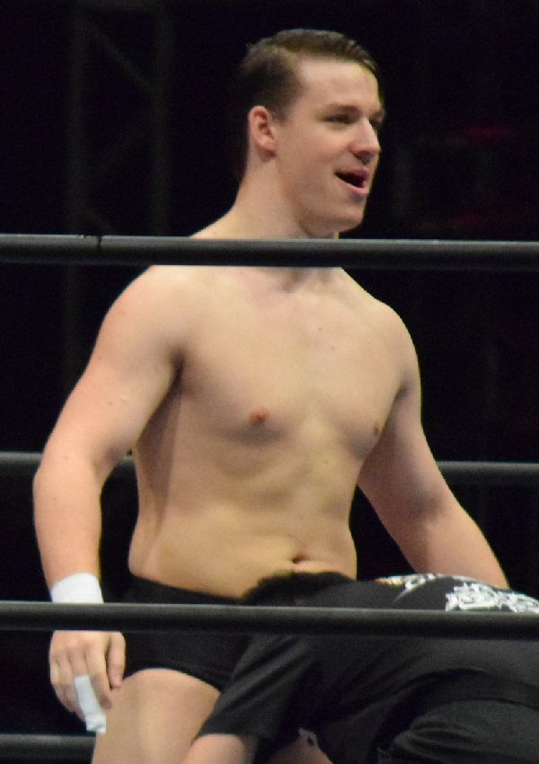 2015年8月1日 大阪府立体育会館 「G1 CLIMAX 25」 デビッド・フィンレー